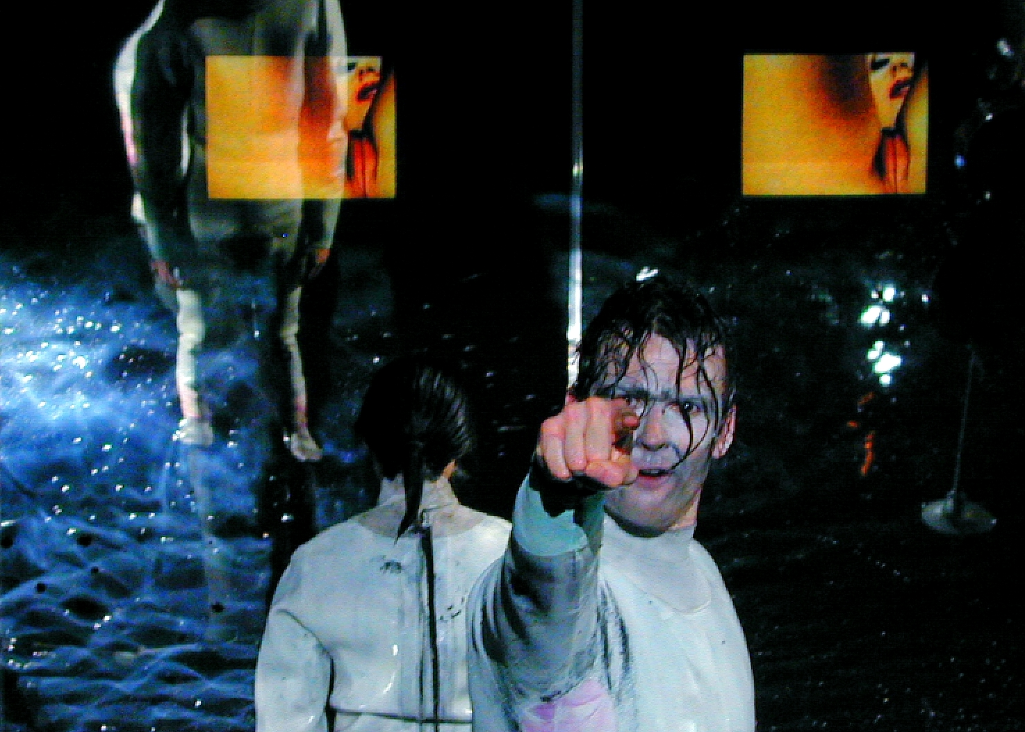 Thomas Schreyer in Bauchgeburt von Rolf Kemnitzer, Regie: Urs Odermatt. Saarländisches Staatstheater.